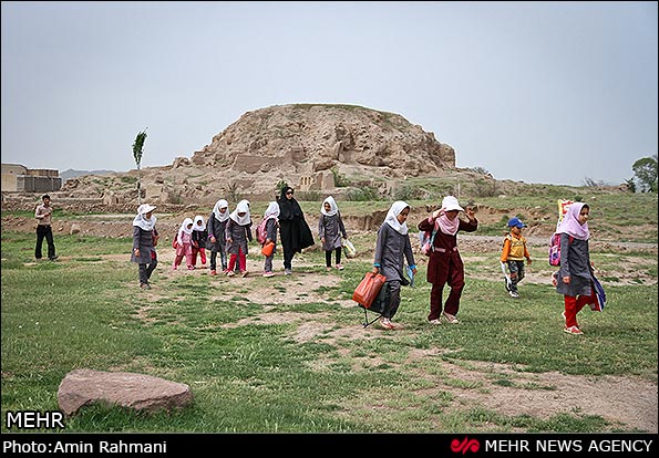 تپه بزک کندر